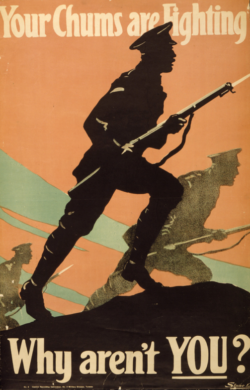 Propaganda Primera Guerra Mundial